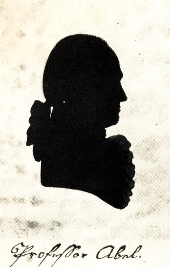 Getuschter Schattenriss von Jacob Friedrich Abel, der den jungen Schiller maßgeblich beeinflusste.